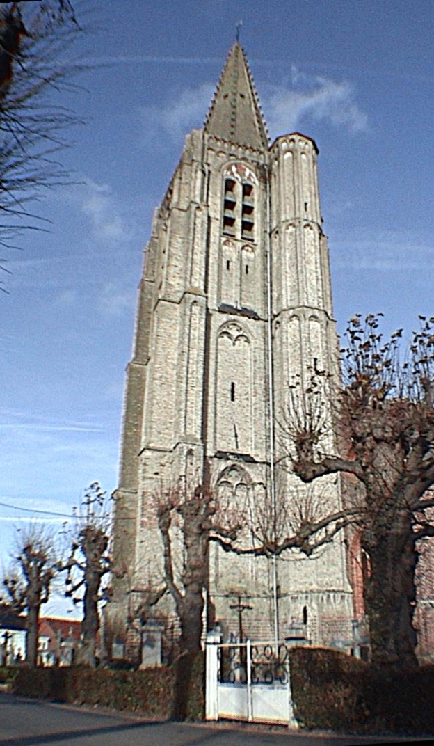 L'église Saint-Antoine (Houtkerque)